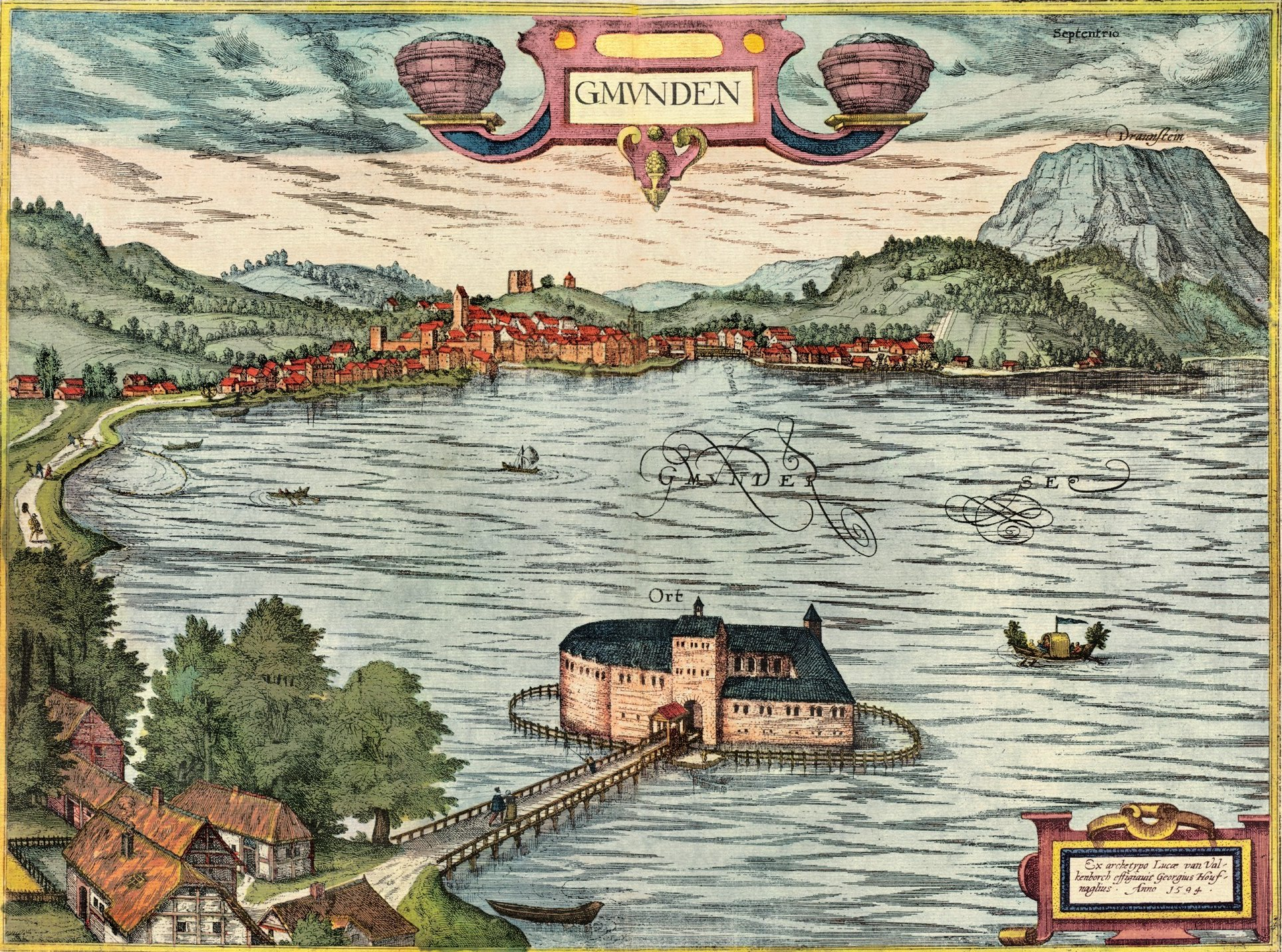 Stadtansicht Gmunden aus Civitates Orbis Terrarum. Band V (1598) von Braun & Hogenberg